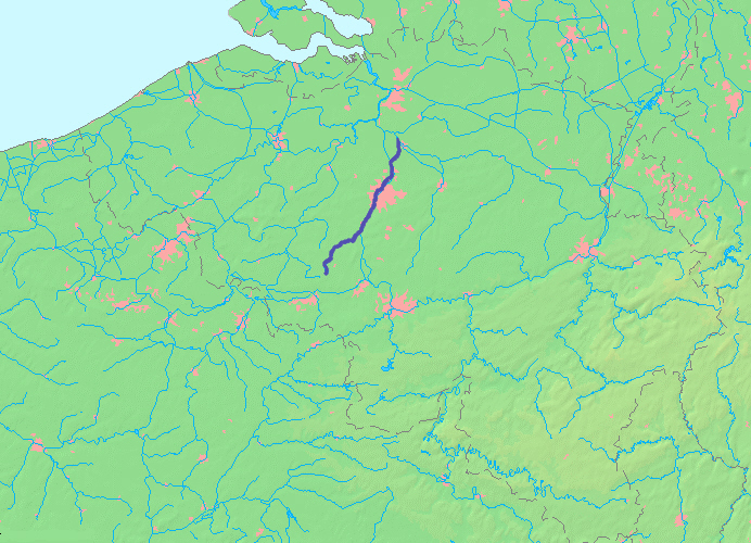 Kaart van de Zenne op basis van Wikimedia Commons kaart MapBelgiumWater